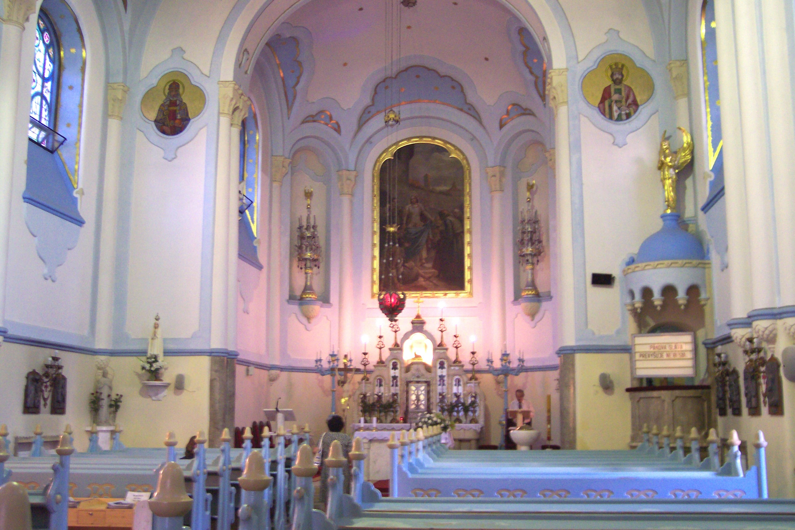 Altar der Blauen Kirche in Bratislava